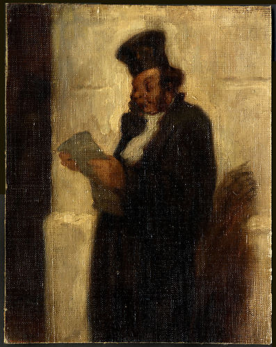 Attribué à Honoré Daumier, L'Avocat au placet, vers 1855, huile sur toile marouflée sur bois, 21 x 26,5 cm. Provenance probable : famille Beugniet. Dédicace de deux lignes au marchand d'art Louis Adolphe Beugniet (10, rue Laffitte) à l'encre (?) noire en bas à droite et signature : "Cher Beugniet / Bien a vous / h. Daumier". Un deuxième avocat est visible sous le vernis derrière à gauche. Collection privée (Suisse). DaumierRegister 9549.